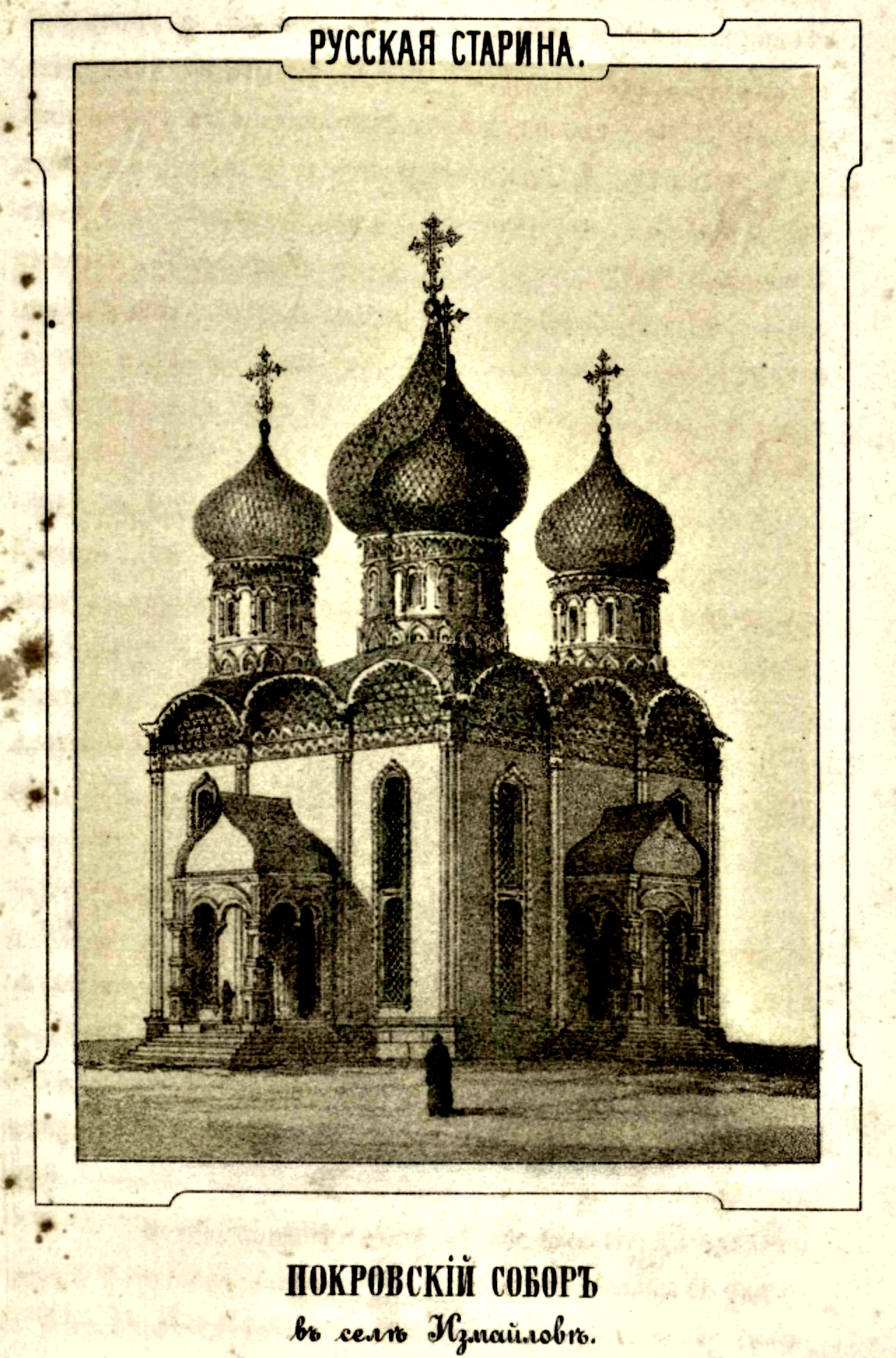 Измайловский дворец. Покровский собор.